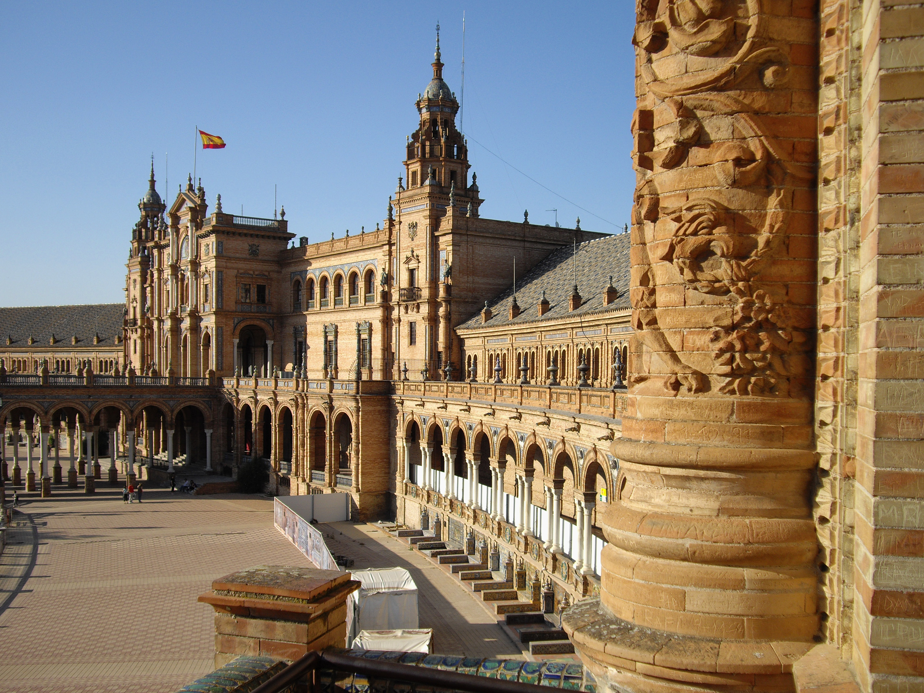 Edificio de la Antigua Capitanía General (vista desde el balcón del primer piso próximo a la torre sur)